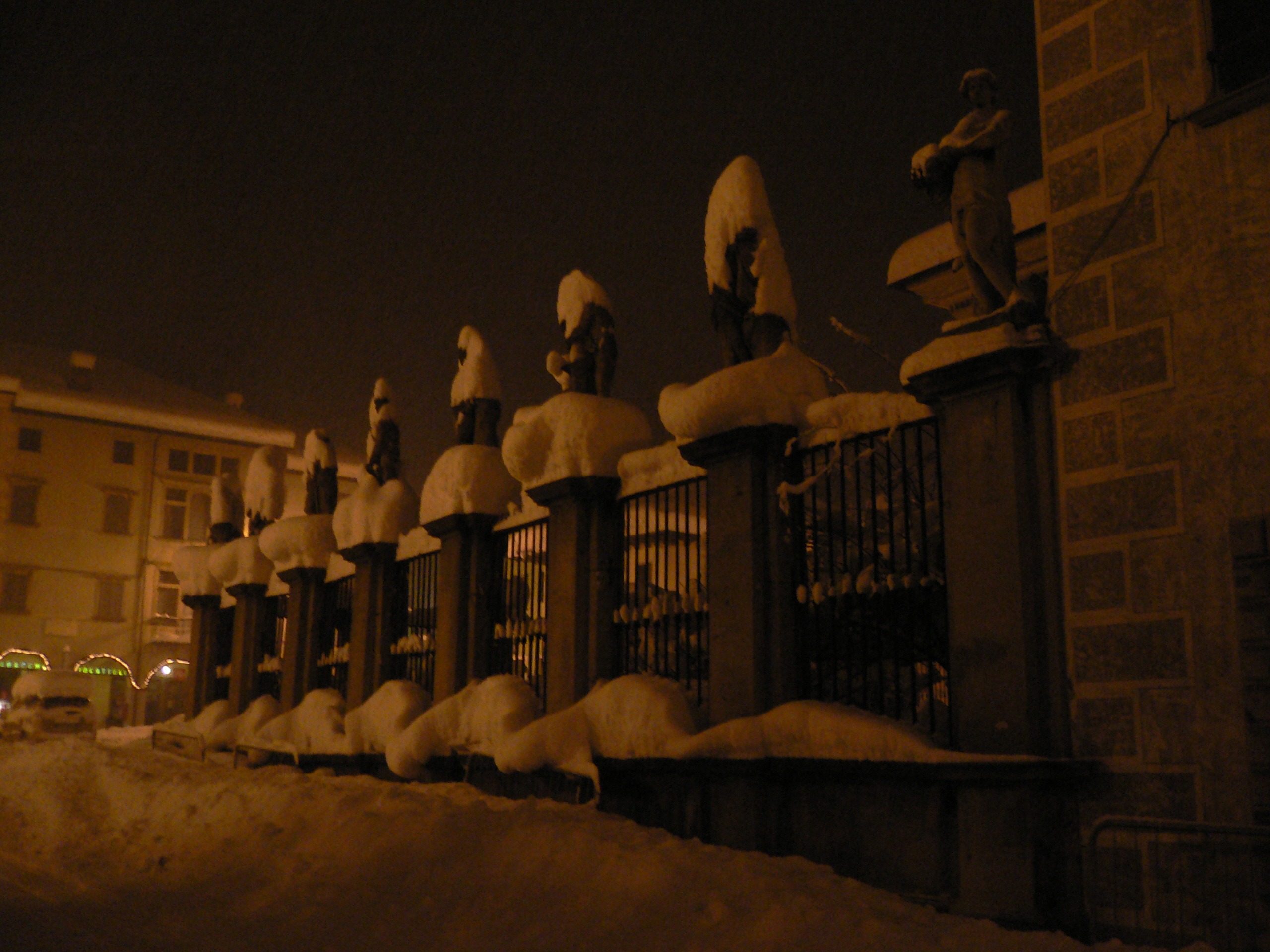 Le statue sul "Palazzo dé Manzoni" in inverno. Agordo (BL)